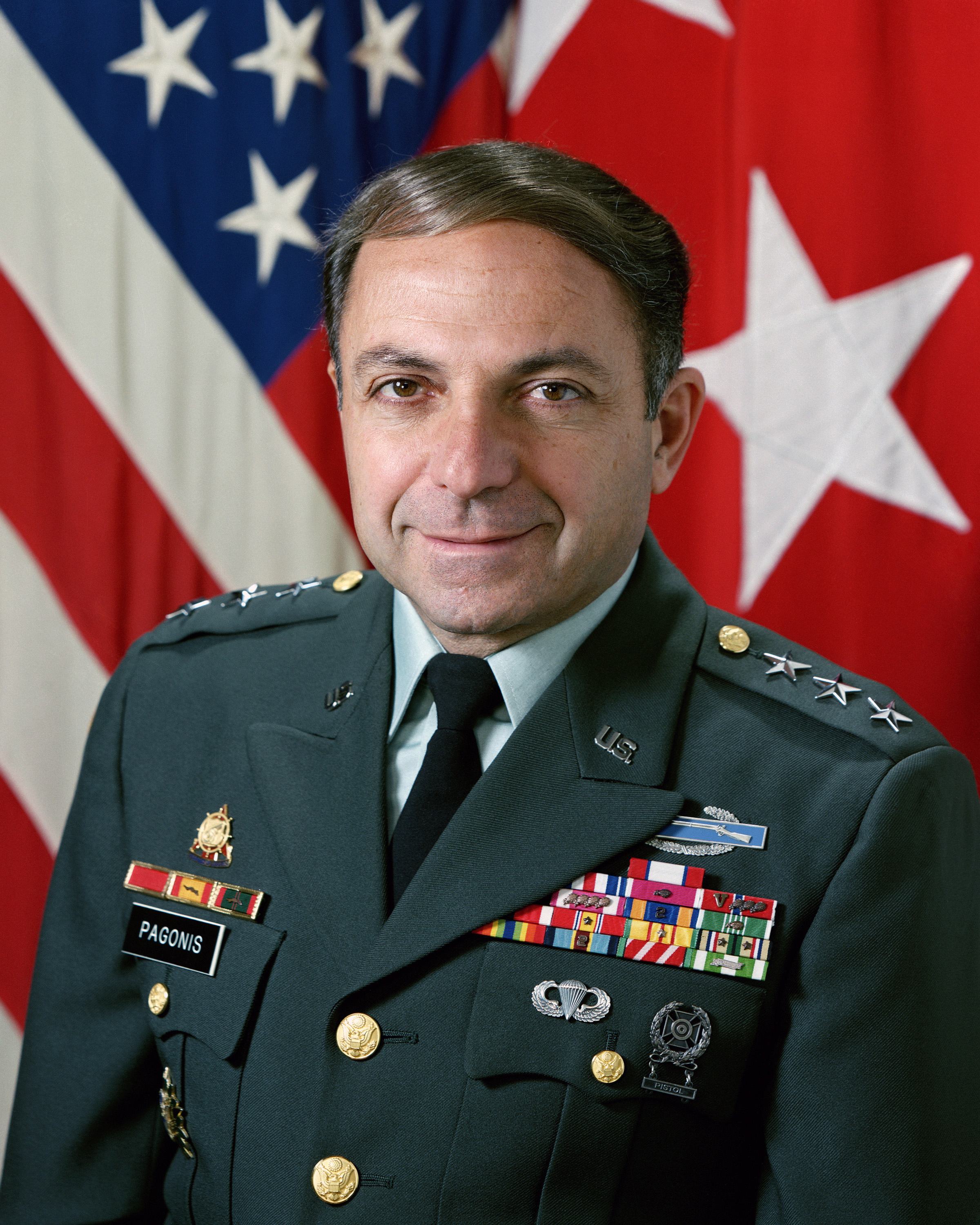 Lieutenant General William Pagonis